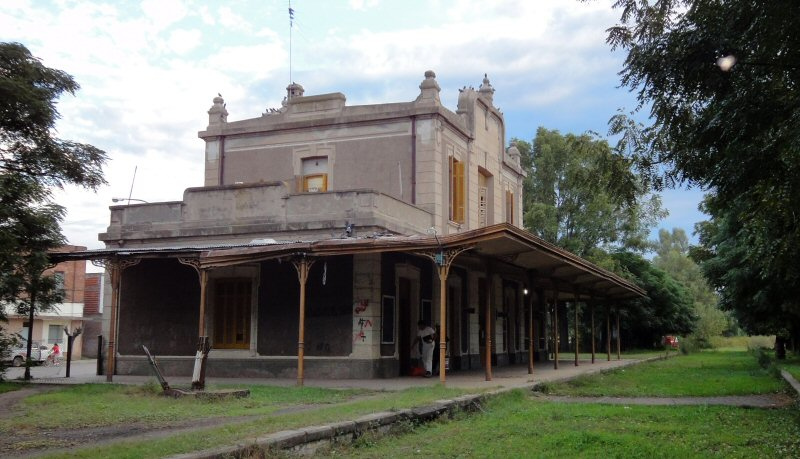 Estación Navarro, ex FFCC CGBA, FCGB